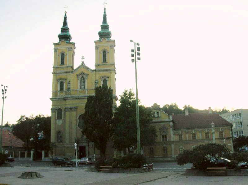 Mindszent Square, Miskolc, Hungary.